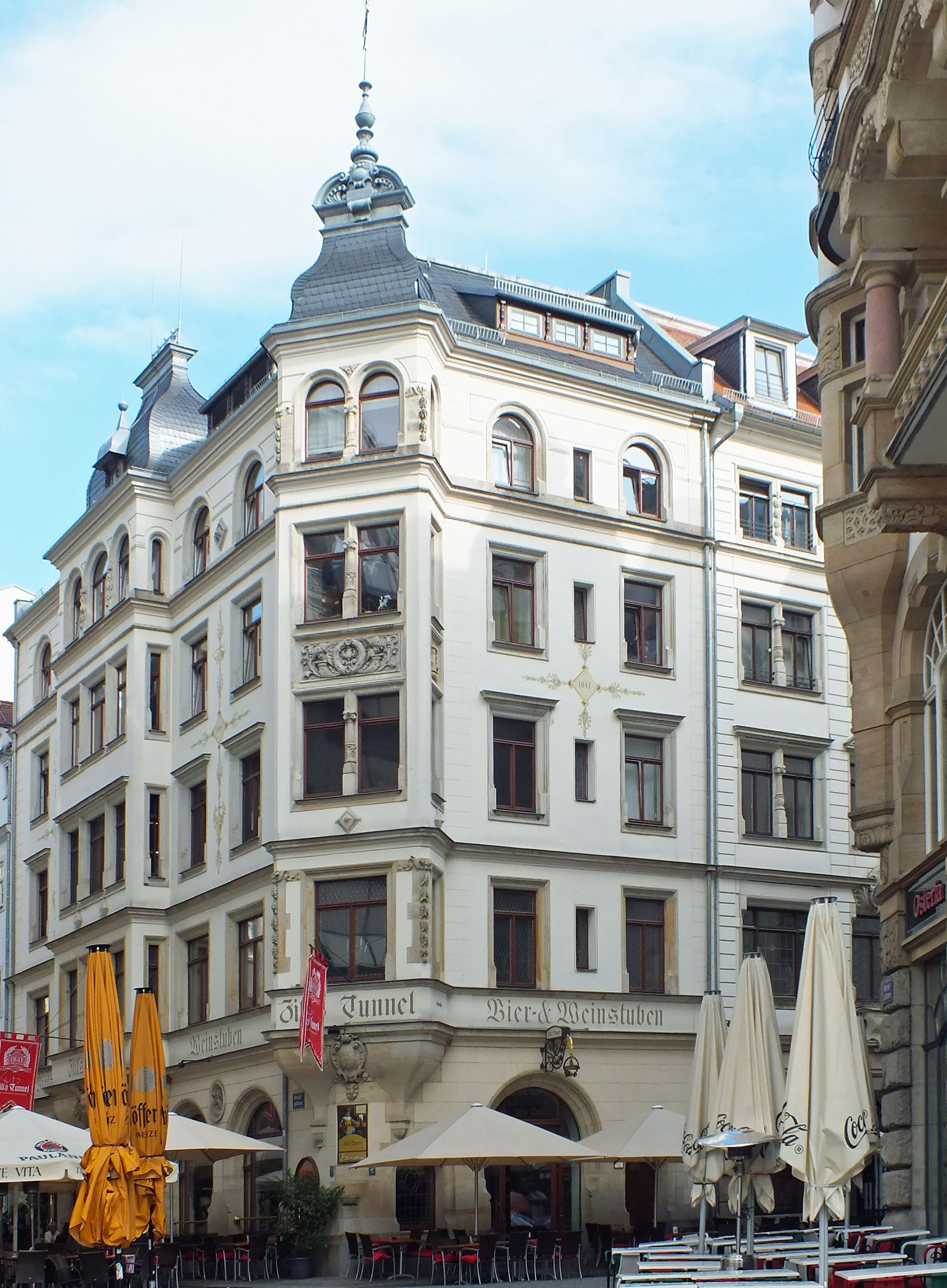 Zills Tunnel in Leipzig, Barfußgäßchen 9